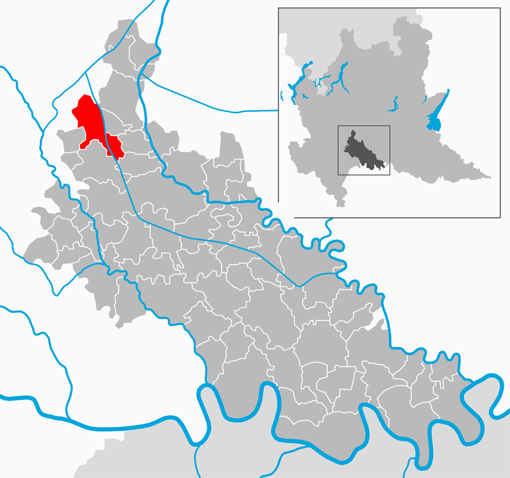 Il comune di Mulazzano nella provincia di Lodi